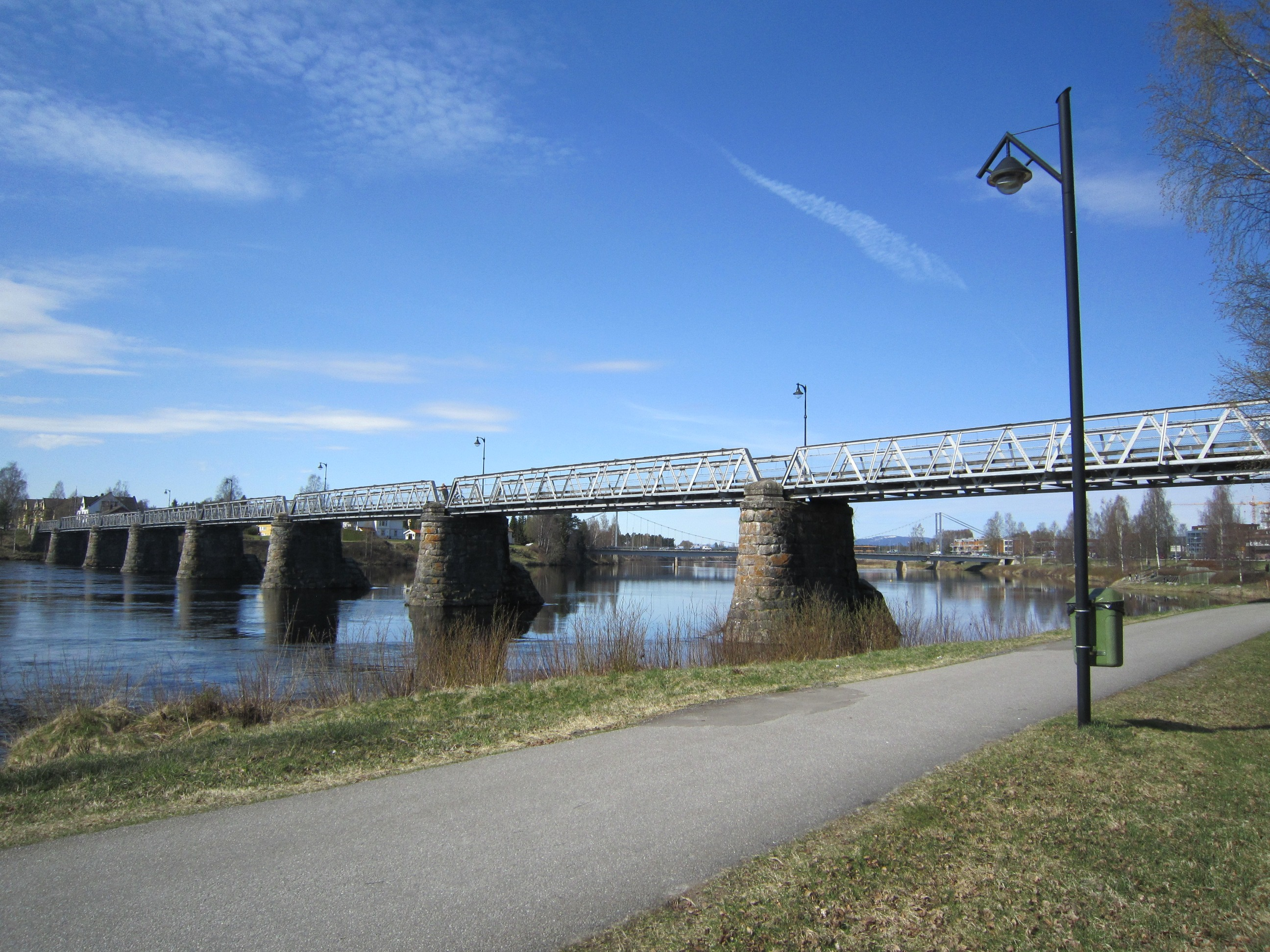 Gamlebrua i Elveum